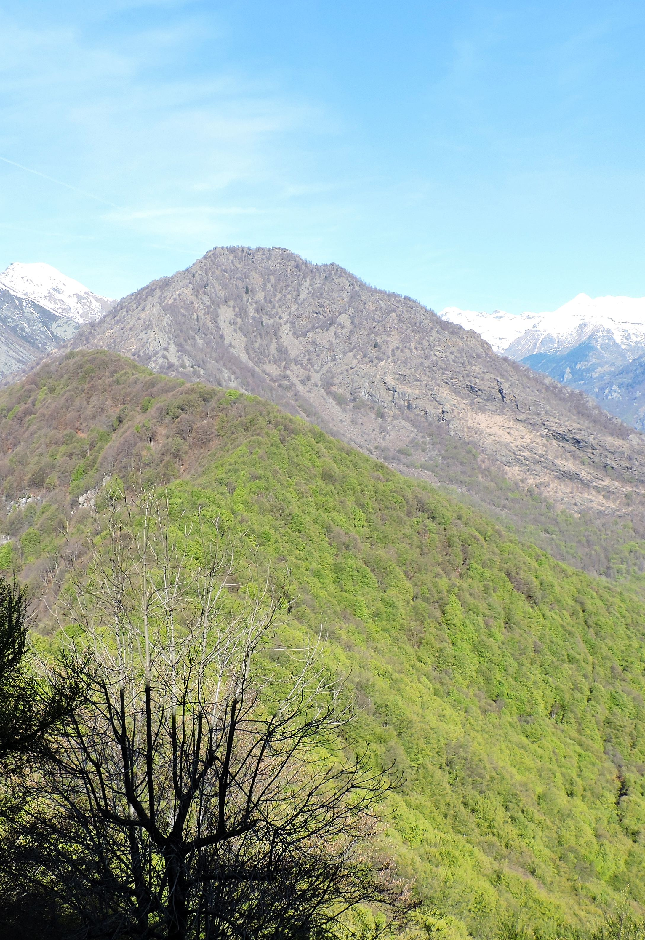 Il Monte Rosso (Ceres/Cantoira) visto dal Santuario di Santa Cristina; a sin. il "Truc Rivalsa"